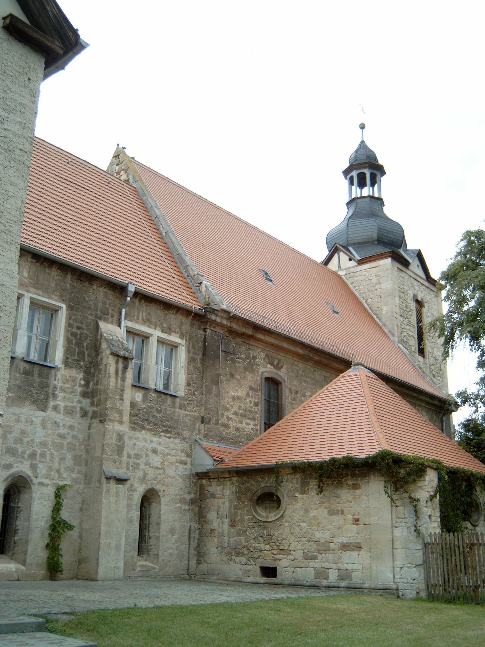 Kirche, Gruft und Krypta Klosterhäseler - Süd-Ansicht